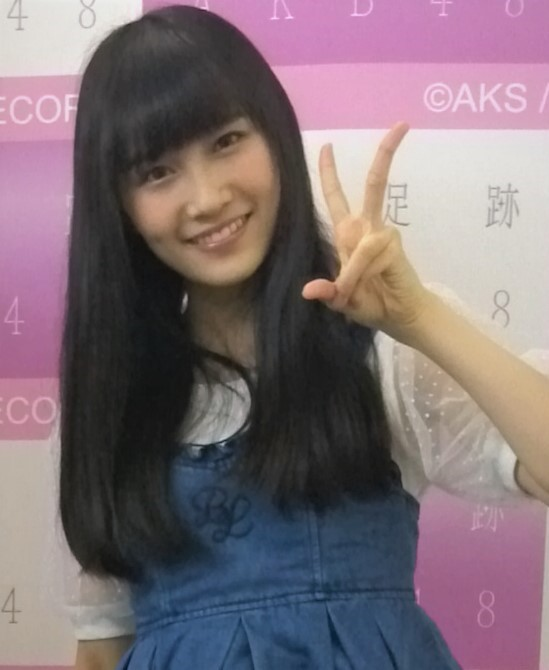 AKB48「次の足跡」発売記念大写真会